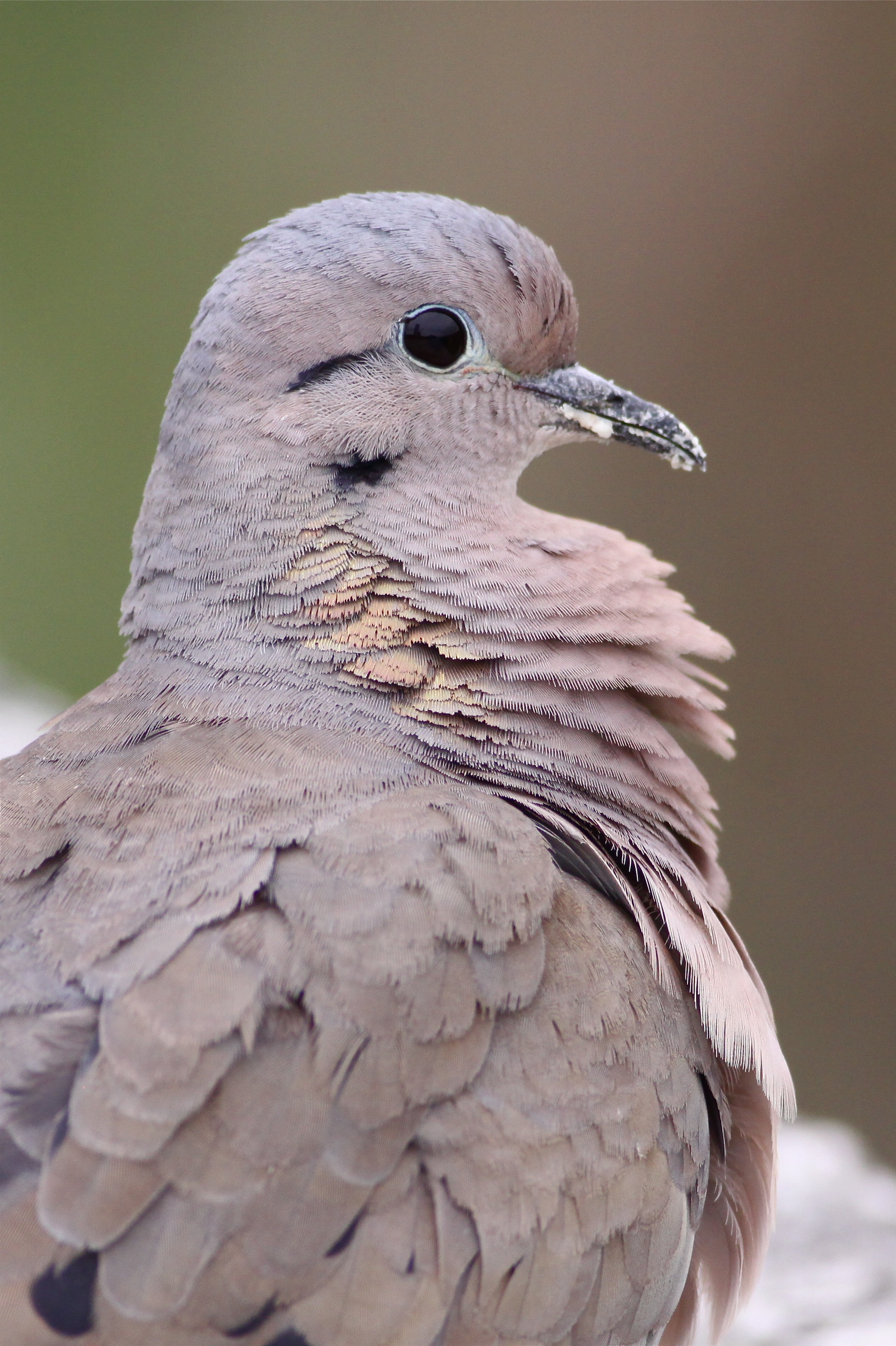 Costanera Sur Nature Reserve, Buenos Aires, Argentina